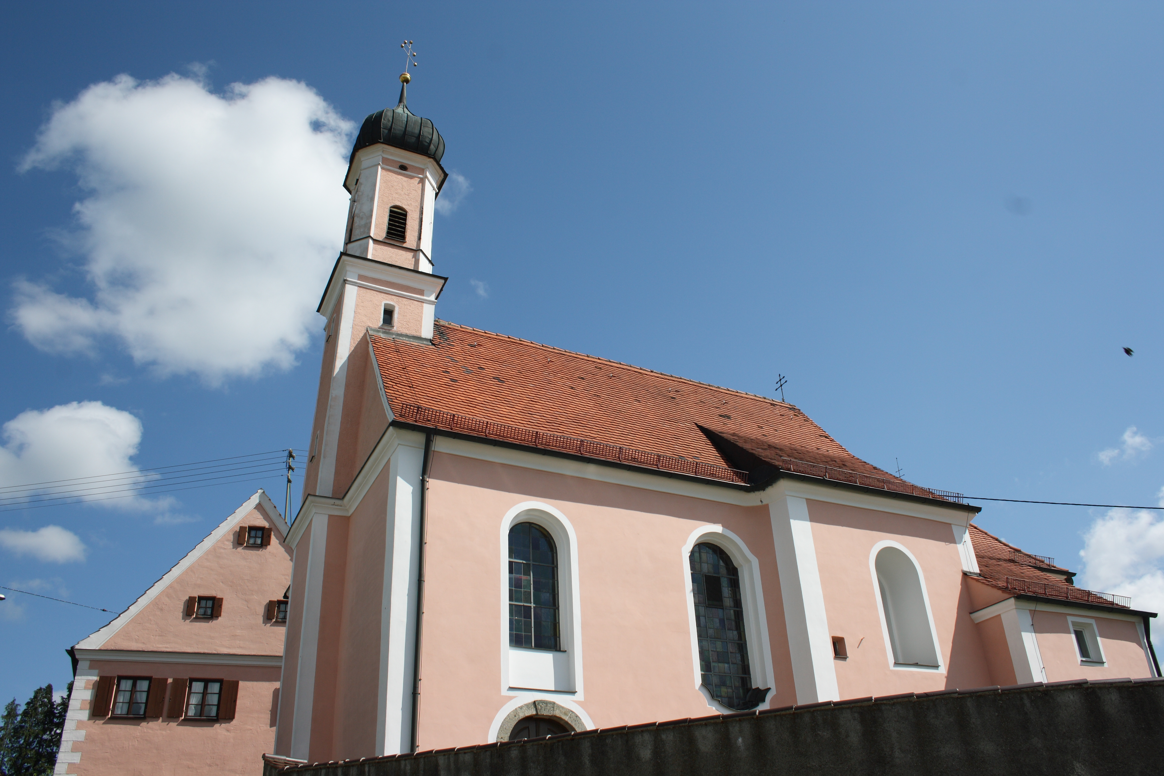 katholische Filialkirche St. Leonhard in Oberliezheim